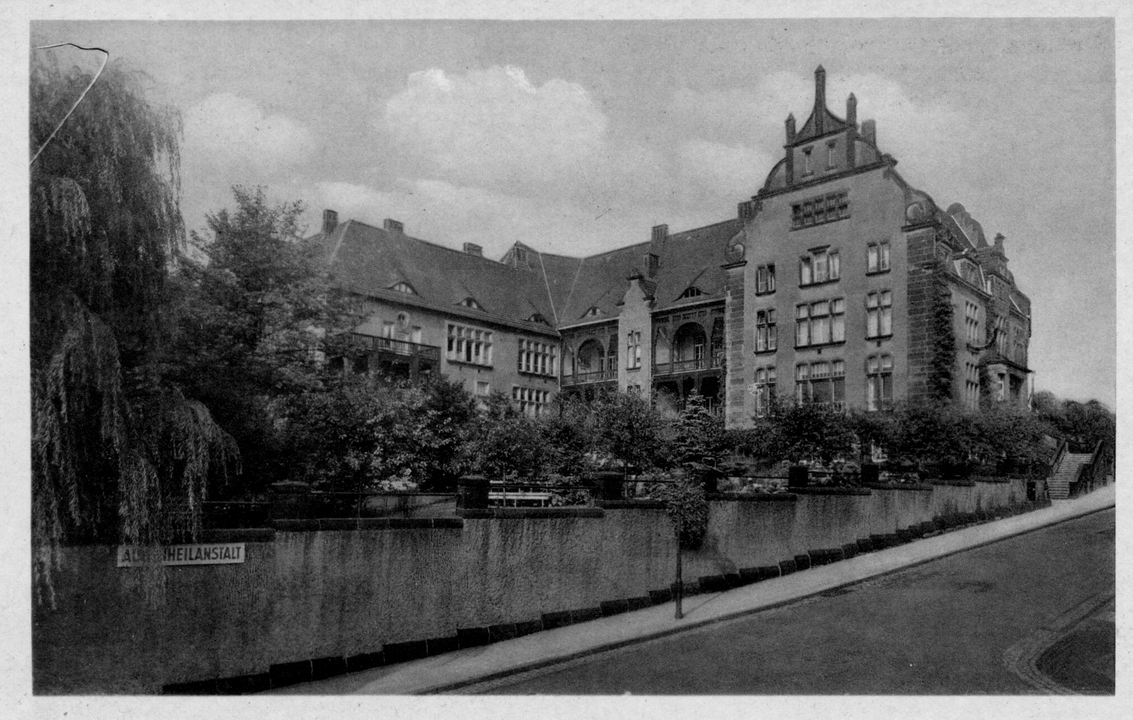 Postkartenansicht der 1907 in Mülheim an der Ruhr eröffneten Augenheilanstalt (seit 2013 Haus der Stadtgeschichte)